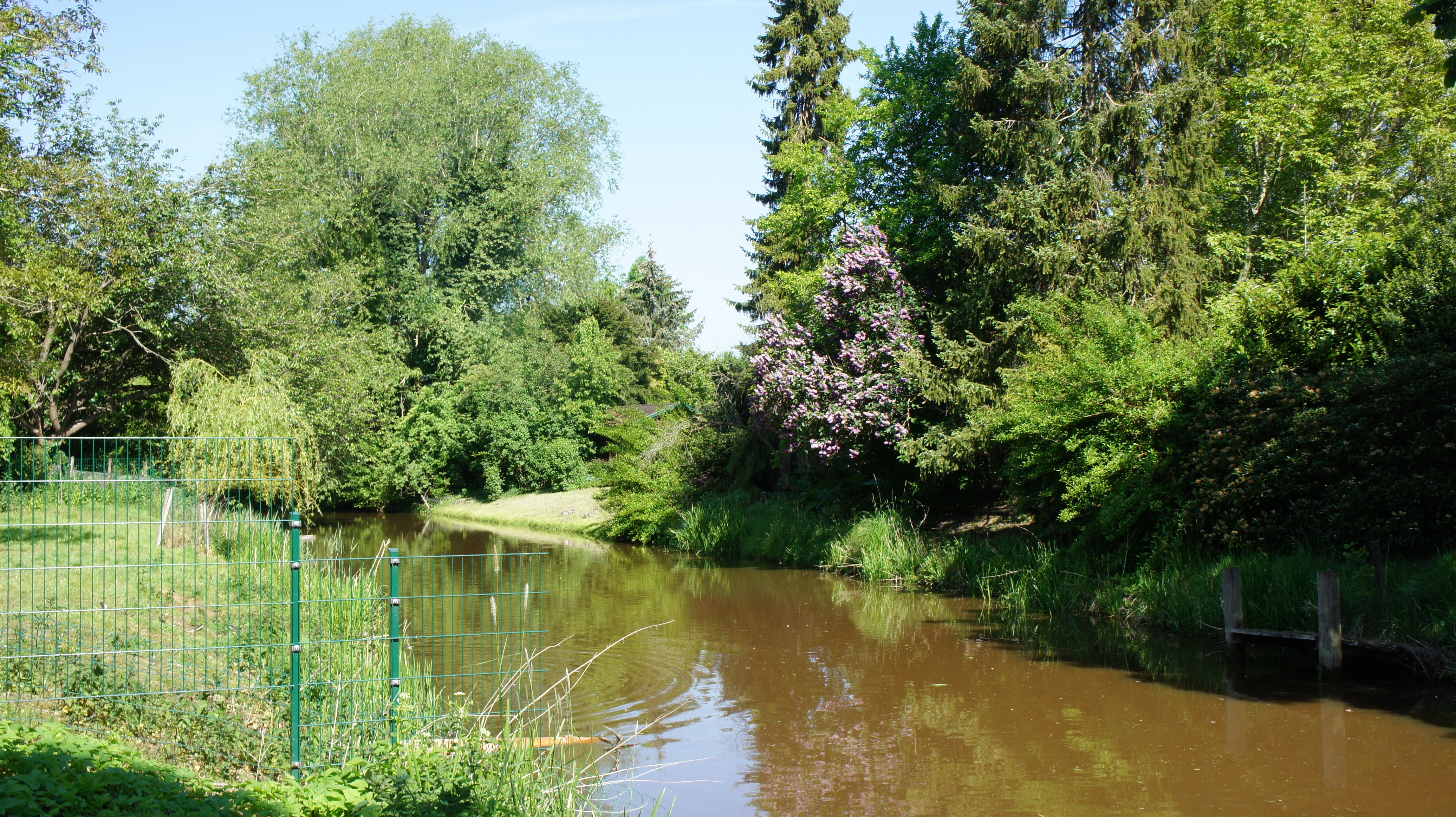 Das Käseburger Sieltief in Großenmeer